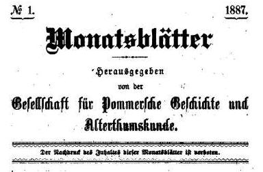 Titelblat der ersten Ausgabe der Monatsblätter